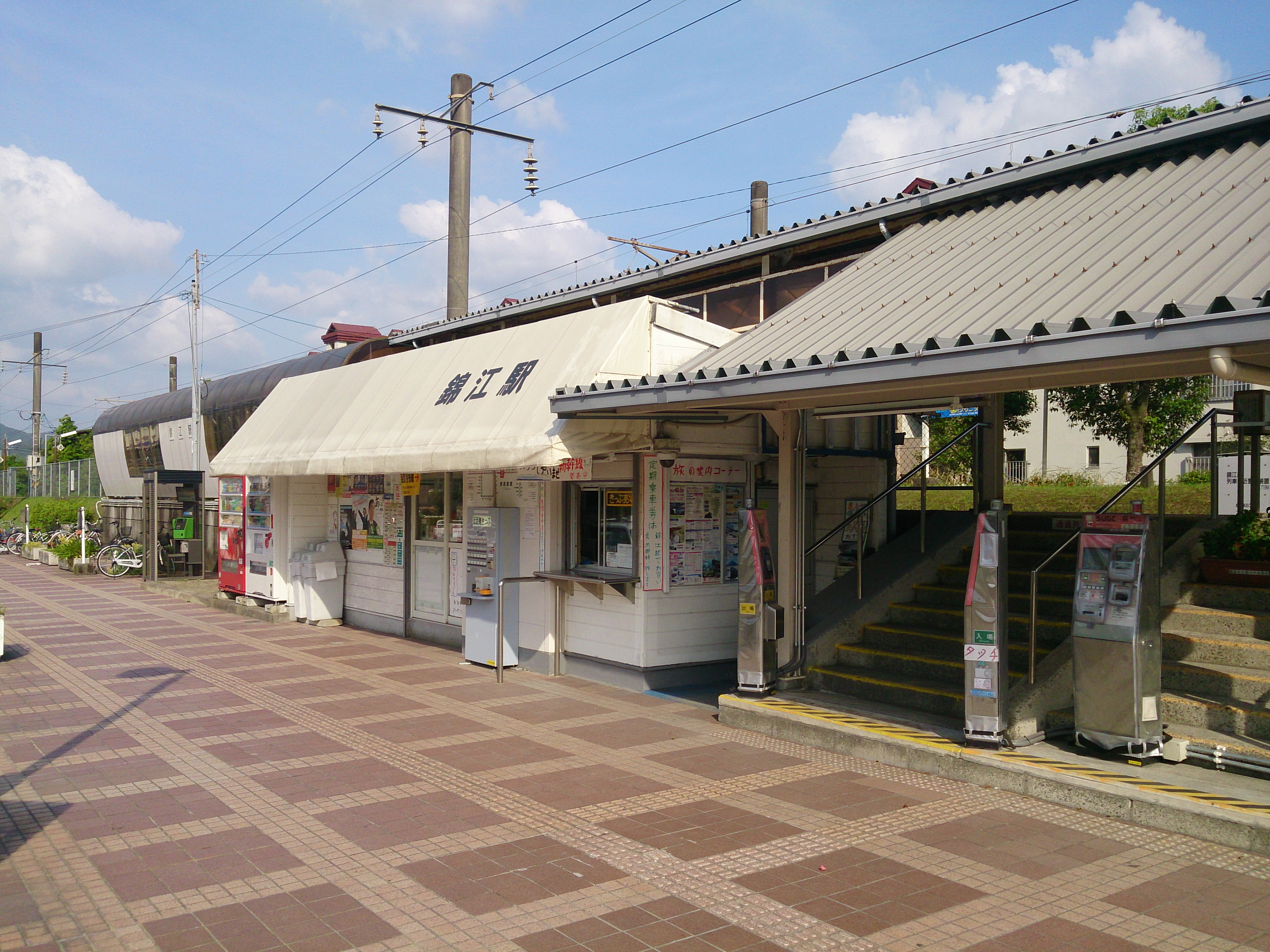 錦江駅 駅舎